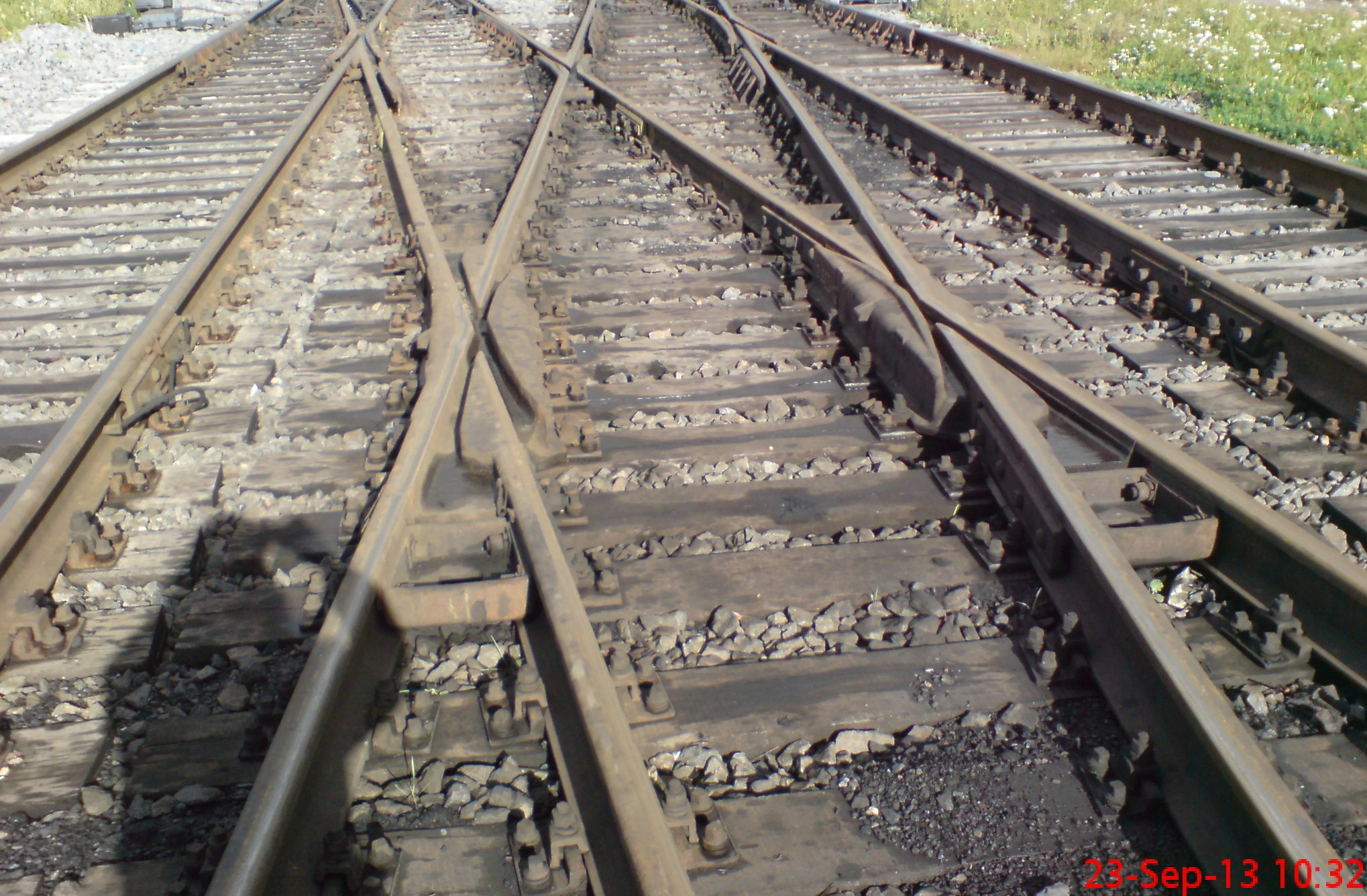 Nekustīga ceļu krustojuma 2/9 divi strupi krusteņi